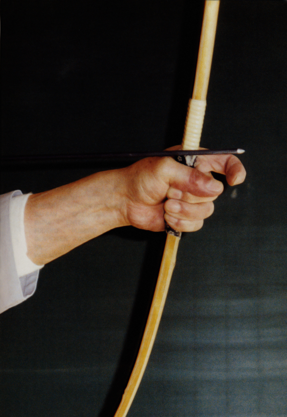 Professor Inagaki Genshiro Yoshimichi 9. Dan Hanshi, 1911-1995 Leiter der Heki Ryū Insai Ha November 1993 im Dōjō der Tsukuba Universität in Japan